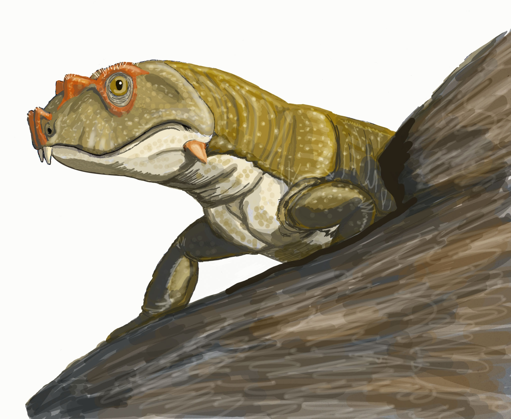 De kop van de Tetraceratopiër Tetraceratops als tussenstap.